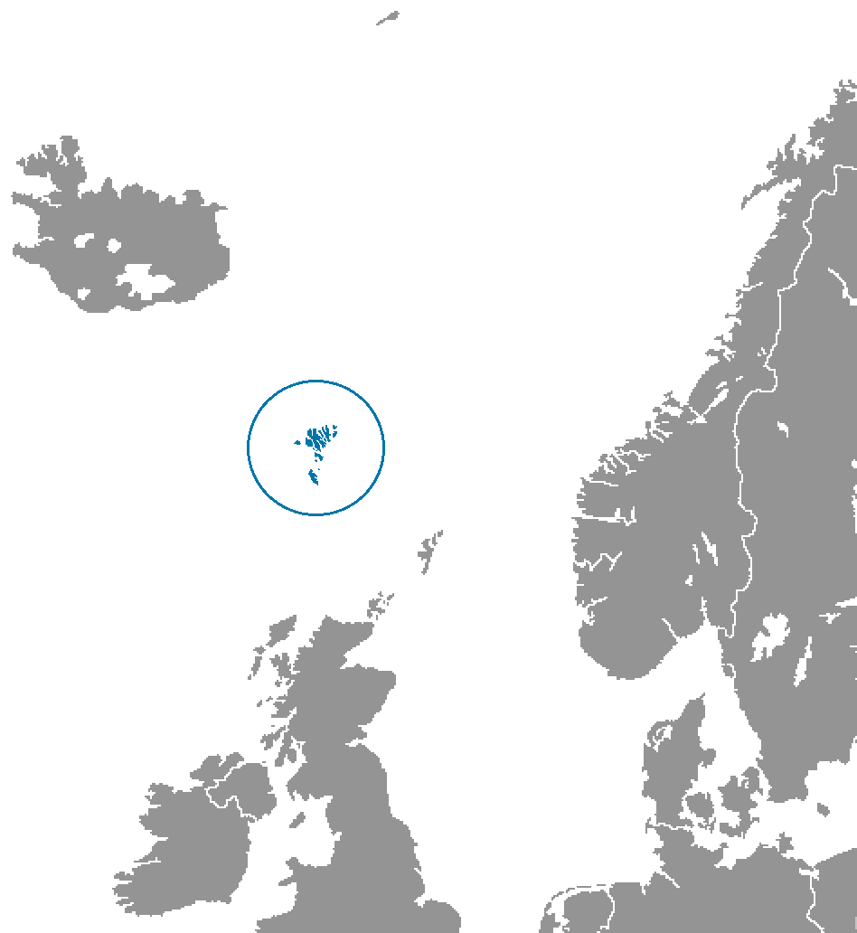 Idioma feroés